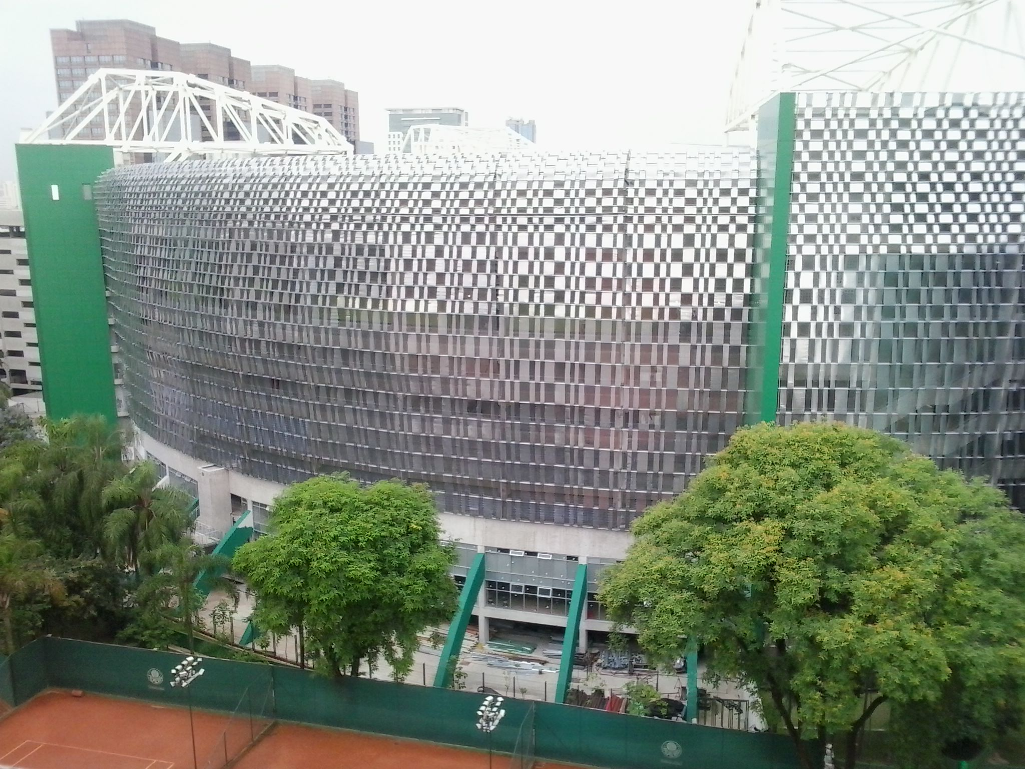 Vista Externa do Allianz Parque atrás das quadras de tênis da Sociedade Esportiva Palmeiras